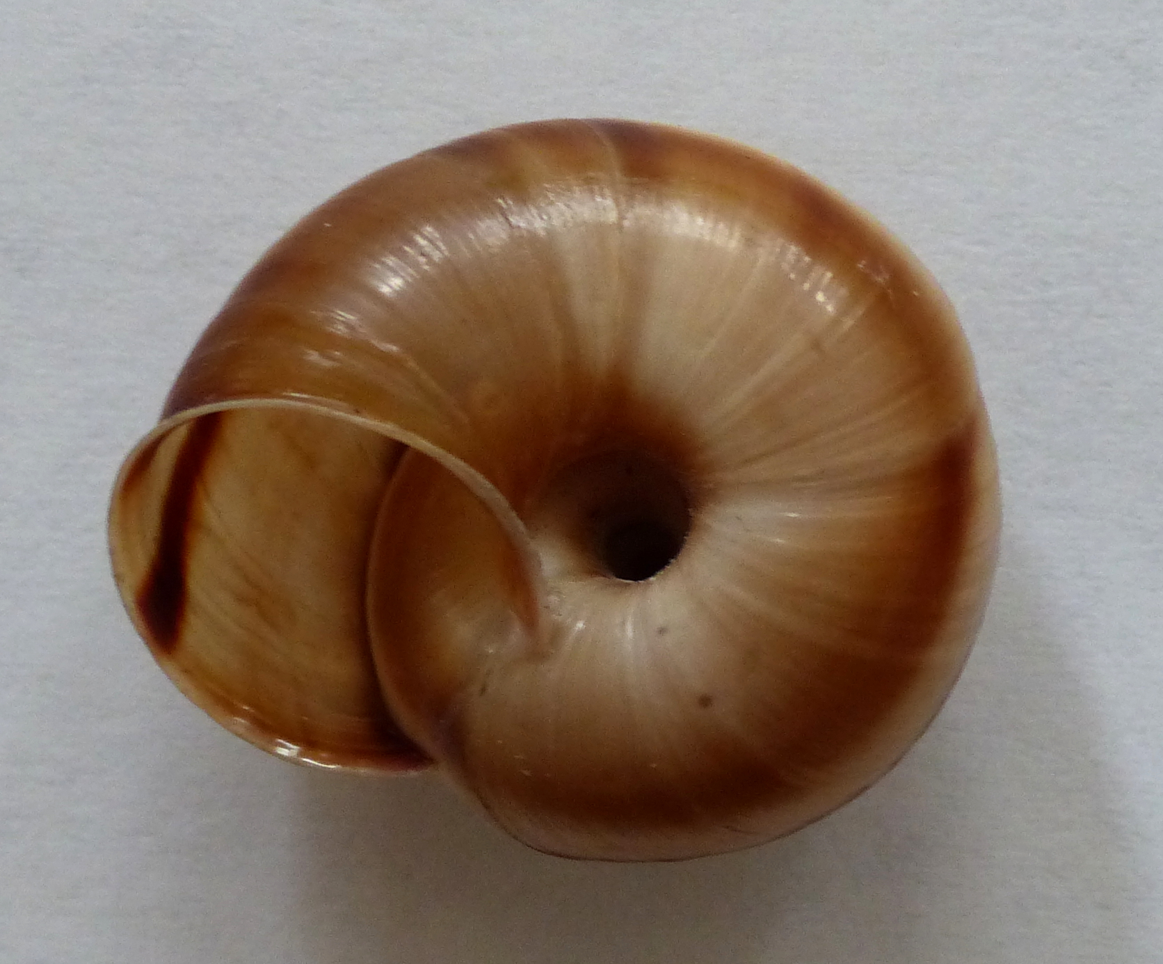 Chilostoma cingulatum apuanum ombilic